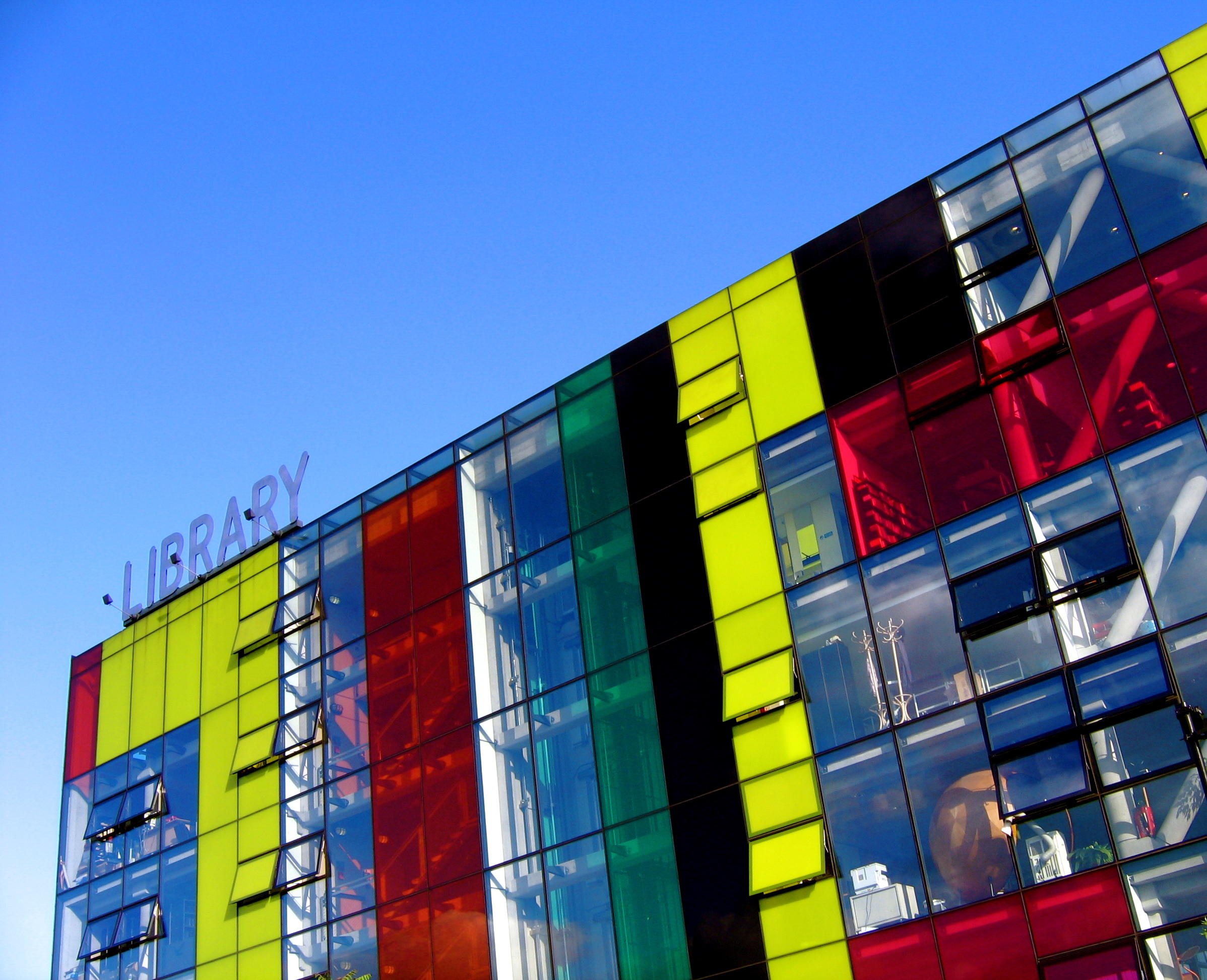 Peckham Library